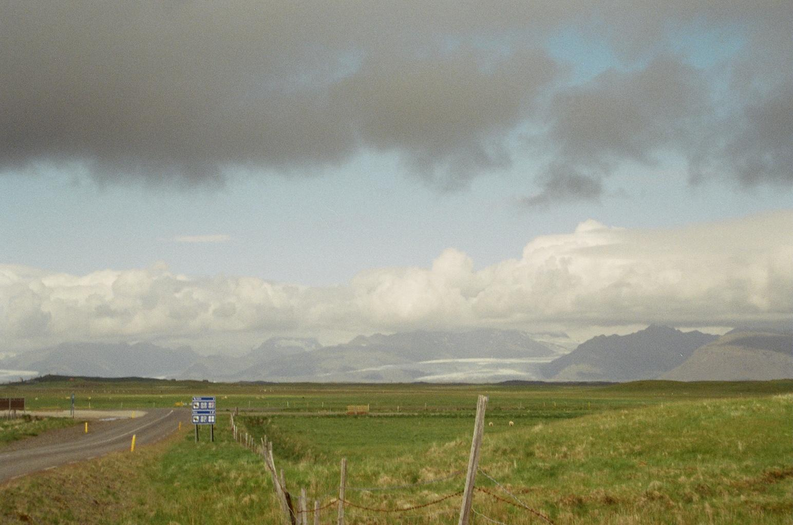 Das Bild zeigt einige Gletscherzungen des Vatnajökull nördlich von Höfn í Hornafirði, Island.